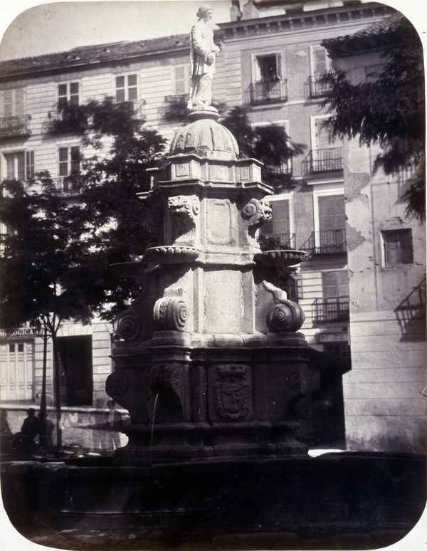 Fuente de la plaza de Santo Domingo. Obra en 1864 del fotógrafo toledano Alfonso Begué, muerto el 31 de octubre de 1865. Cartulina sepia. Albúmina. 43 x 32 cm. Fotografía contenida en un álbum procedente del Archivo de Villa y trasladado al Museo de Historia en 1983.